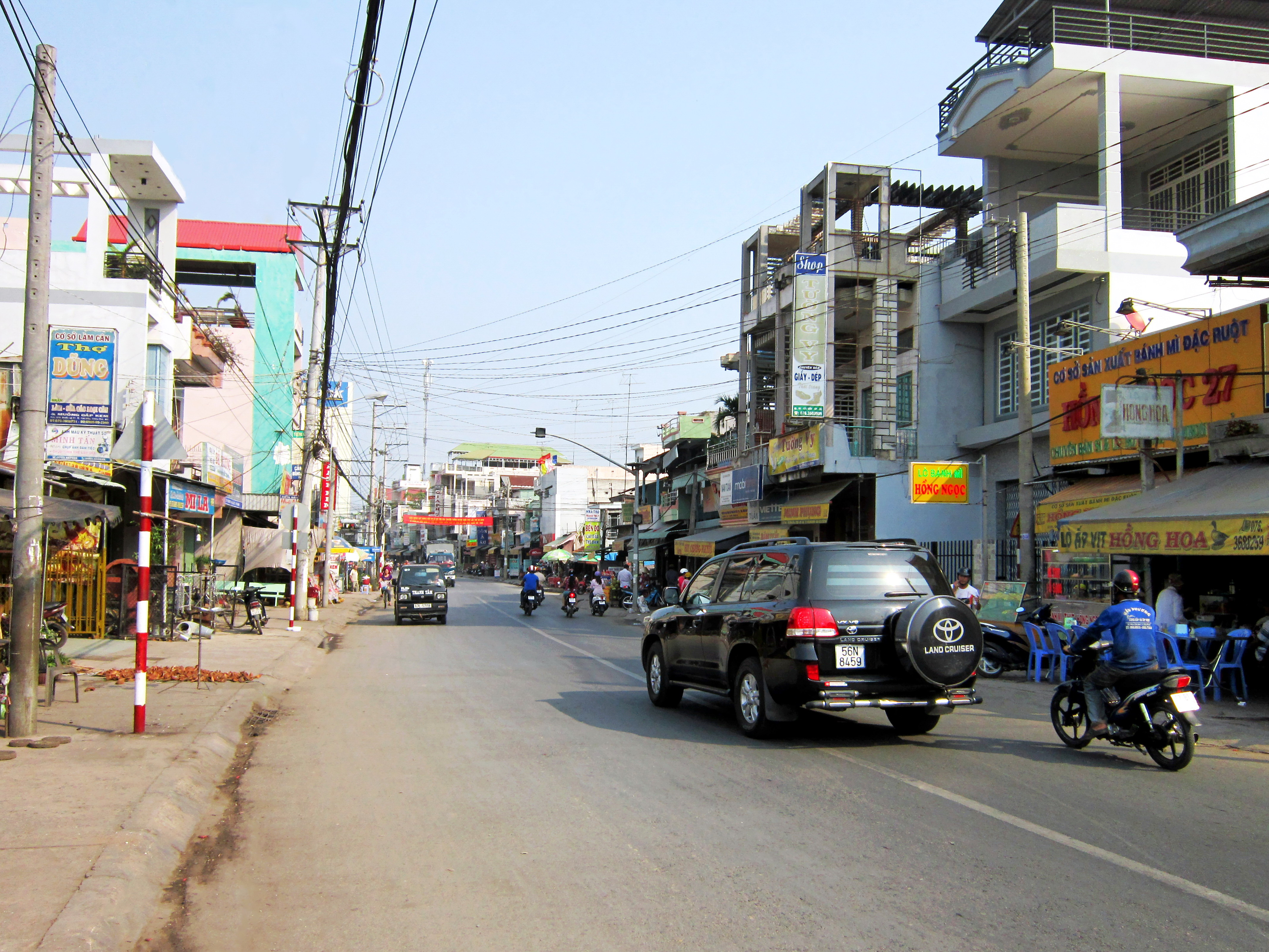 Trên Quốc lộ 91, đoạn đi qua trung tâm thị trấn Cái Dầu, huyện Châu Phú, tỉnh An Giang, Việt Nam.